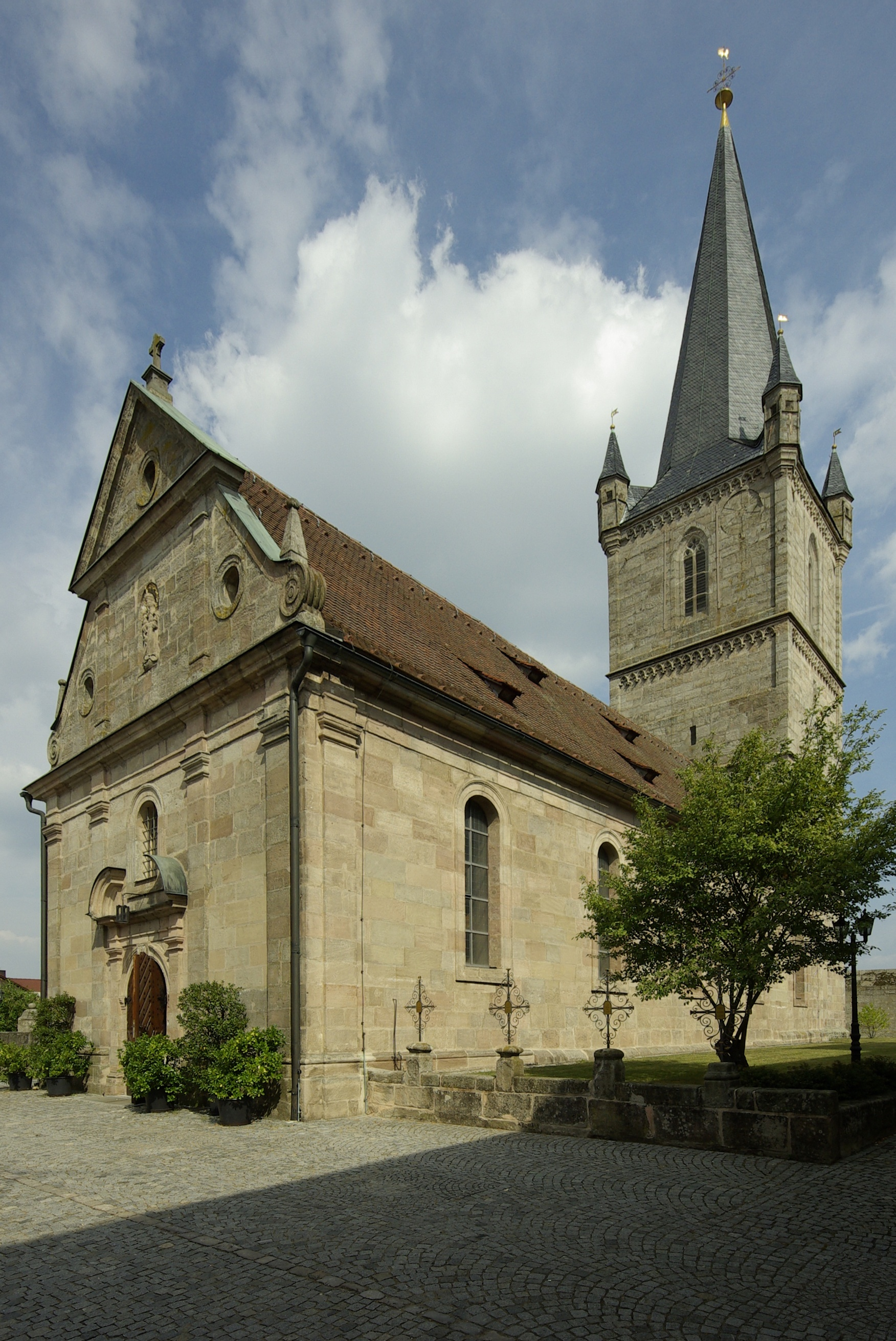 Kirchenburg der Pfarrkirche Geburt Mariens und Katharina in Hannberg (Heßdorf) im Landkreis Erlangen-Höchstadt.